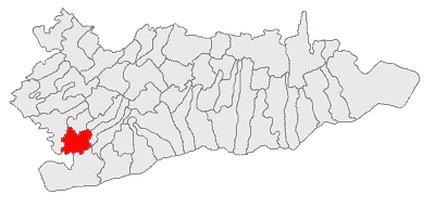 Categorie:Hărţi ale judeţului Călăraşi